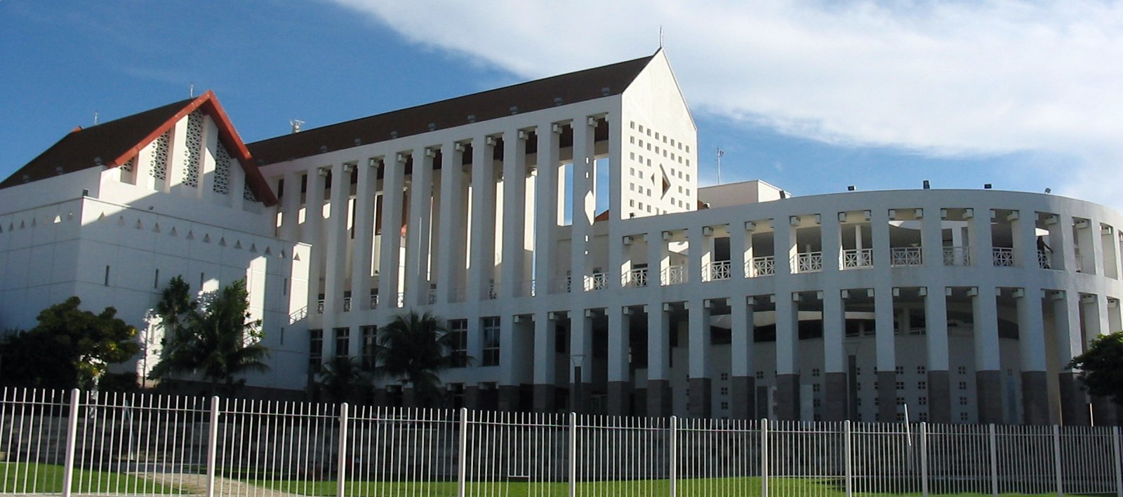 Centro Cultural Dragão do Mar em Fortaleza - Brasil